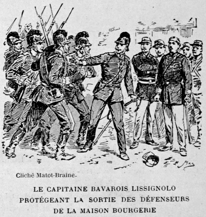 publié dans le "Bulletin de l'œuvre des voyages scolaires".